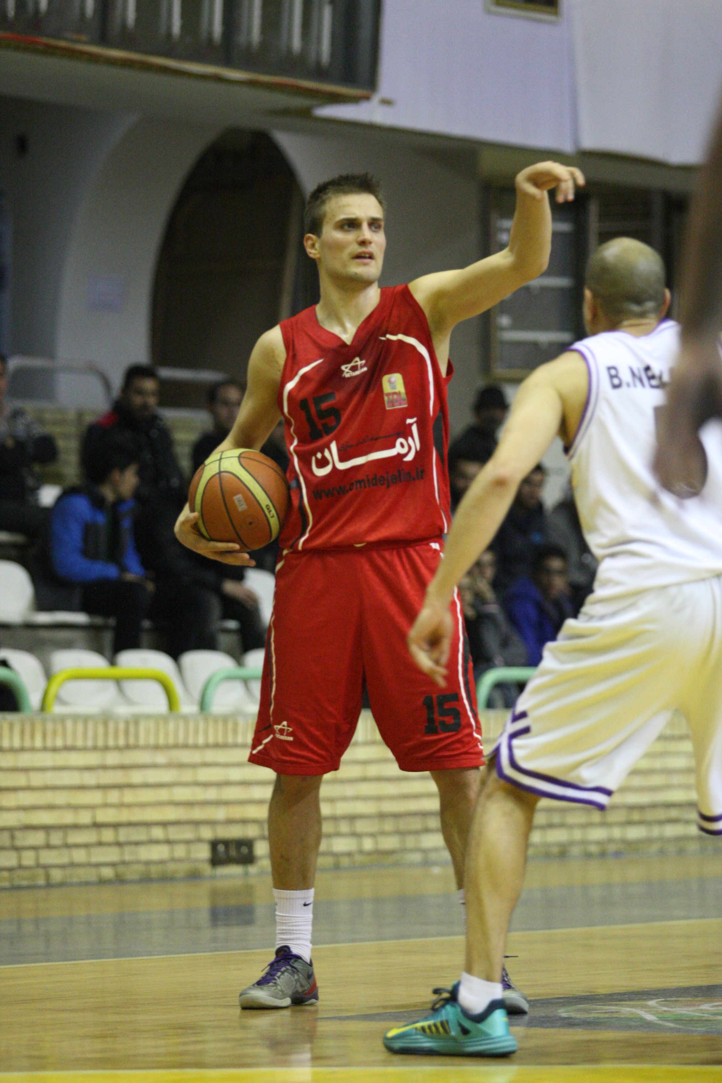 Српски (ћирилица): Немања Ковачевић - Схахрдари Горган, Иран 2014.